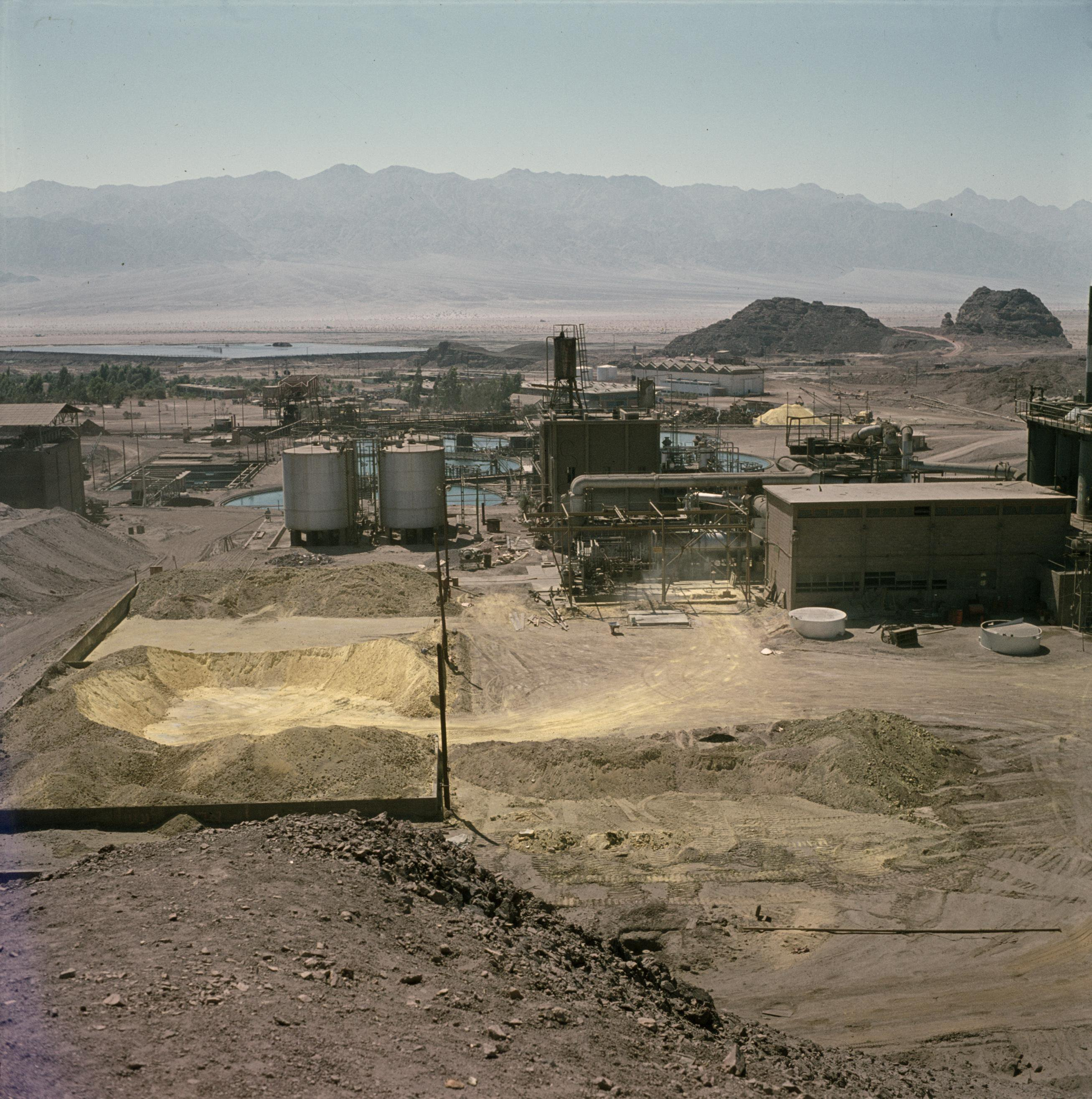 Collectie / Archief : Fotocollectie Van de Poll Reportage / Serie : Israël 1964-1965 Beschrijving : Timna in de Negevwoestijn. Gezicht op de kopermijnen met installaties Datum : 1964 Locatie : Israël, Timna Trefwoorden : industrie, koper, mijnbouw Fotograaf : Poll, Willem van de Auteursrechthebbende : Nationaal Archief Materiaalsoort : Negatief (zwart/wit) Nummer archiefinventaris : bekijk toegang 2.24.14.02 Bestanddeelnummer : 255-9306